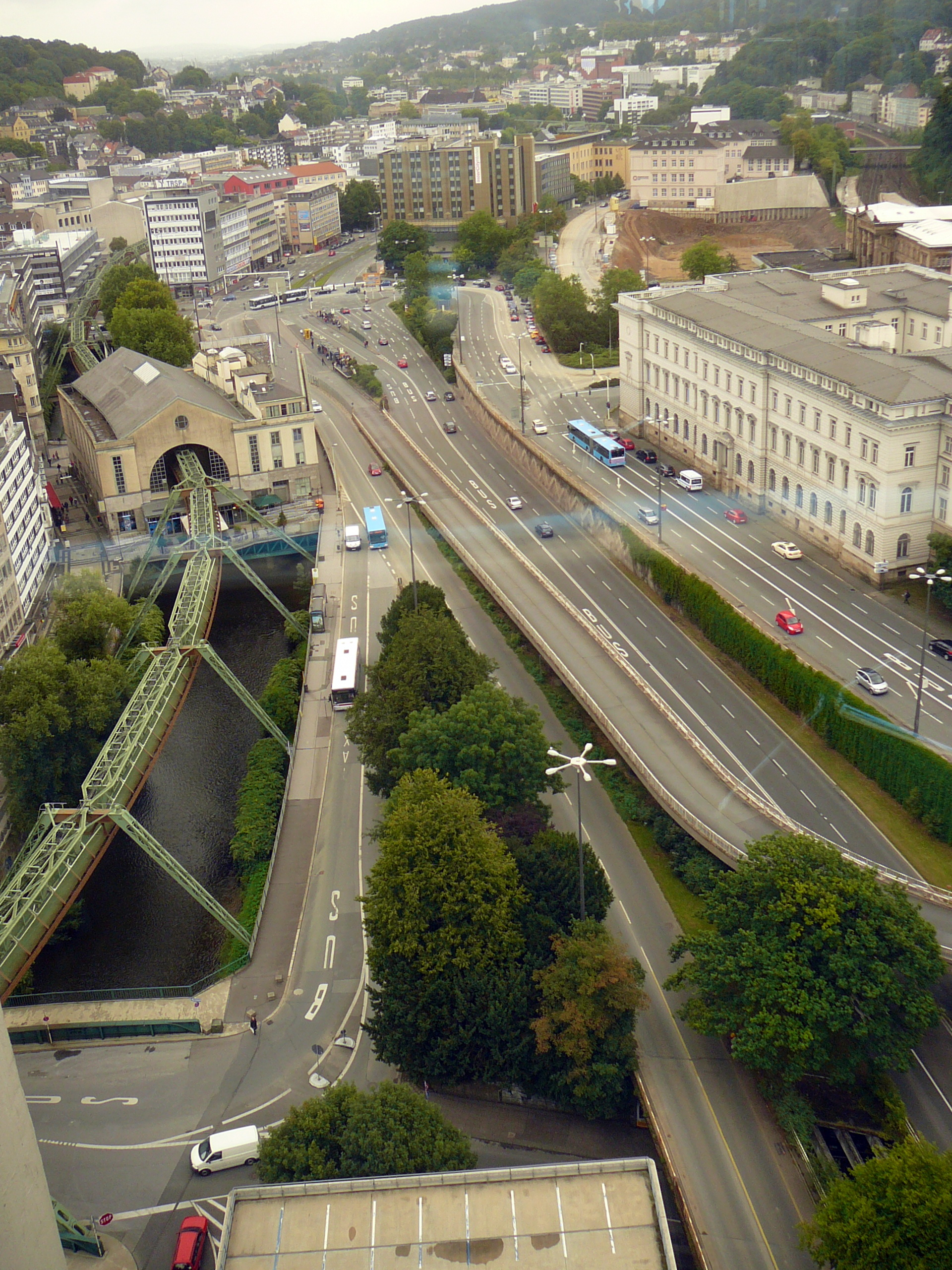 Wuppertal, Islandufer, Blick vom SparkassenturmThis is a photograph of an architectural monument. 1868